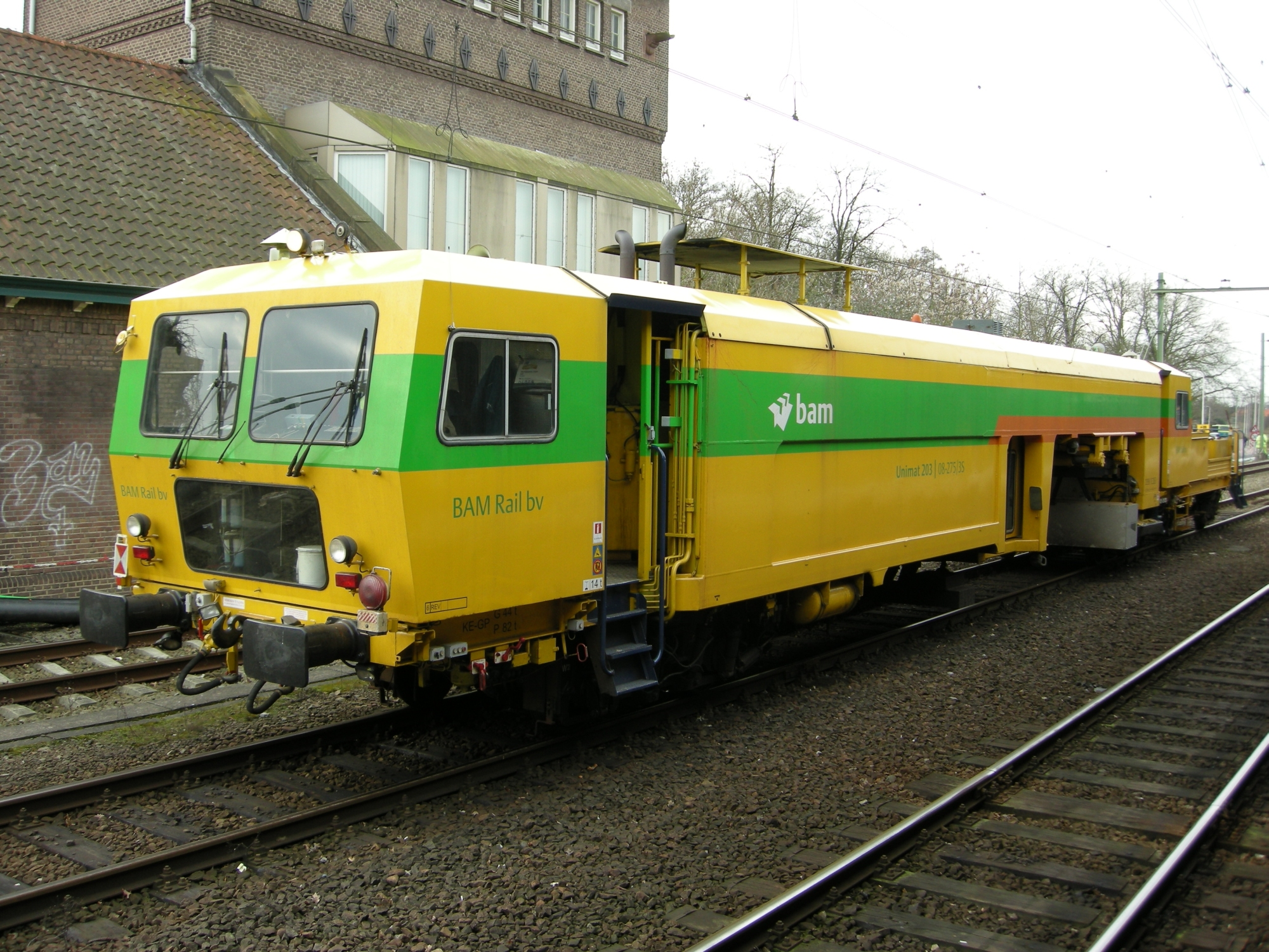 BAM videoschouwwagen op station Deventer